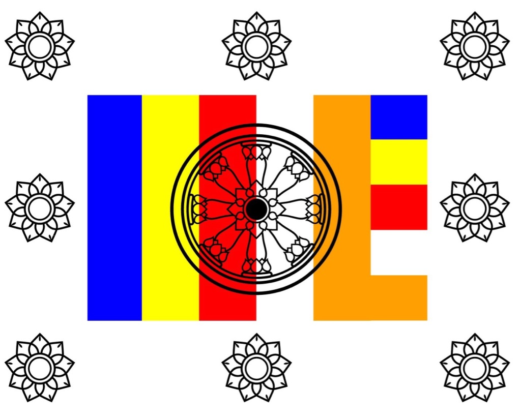 ธงพระรัตนตรัย